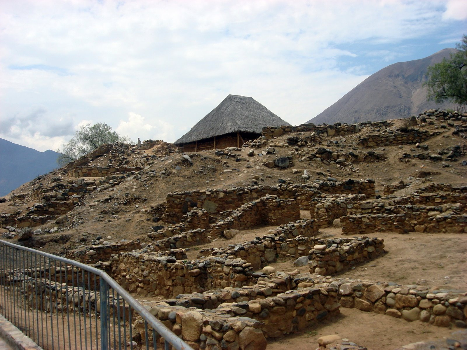 Sitio arqueológico de Kotosh, Huánuco, Perú.